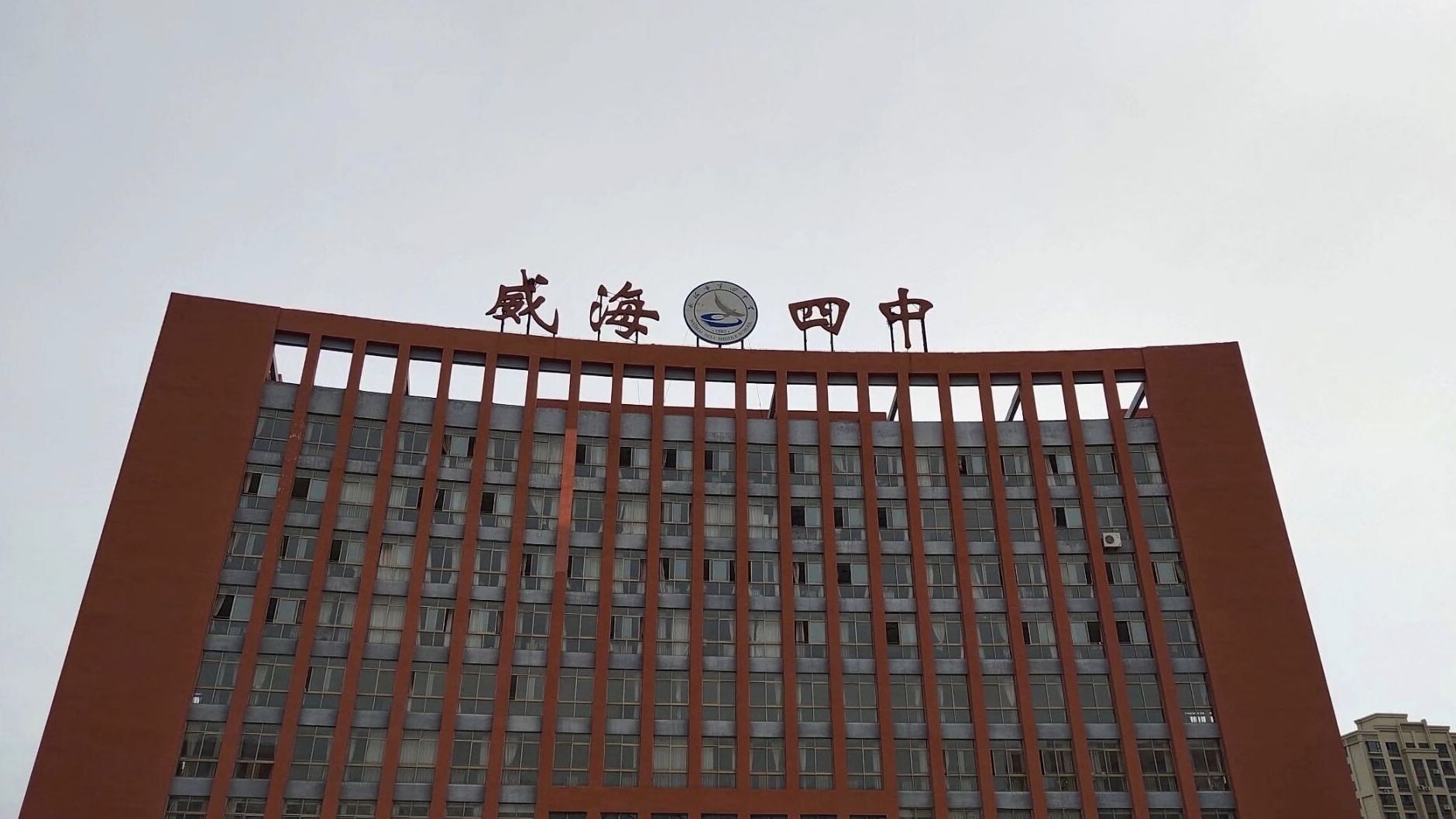 これは威海四中教学棟の写真です。この上で威海四中の校徴があります。これも先生の事務所です。